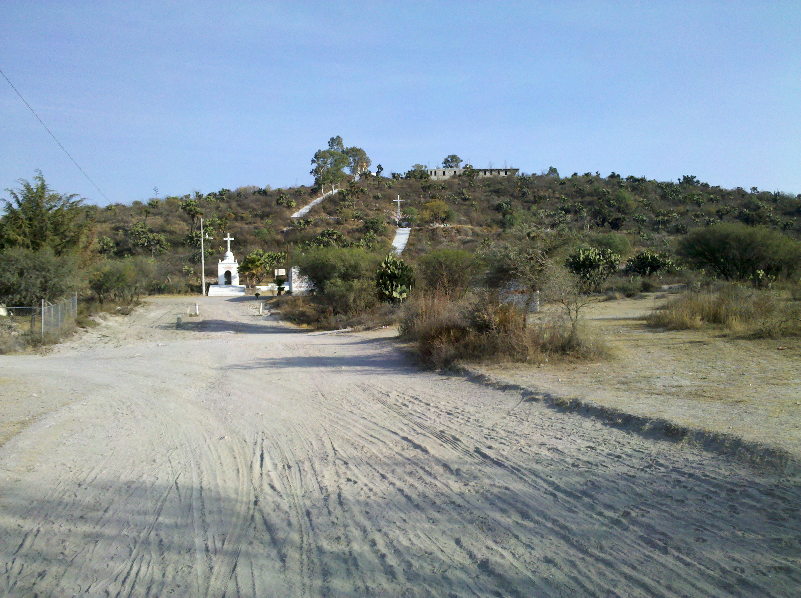 Cerro de Cristo Rey, Tochtepec, Puebla, México.